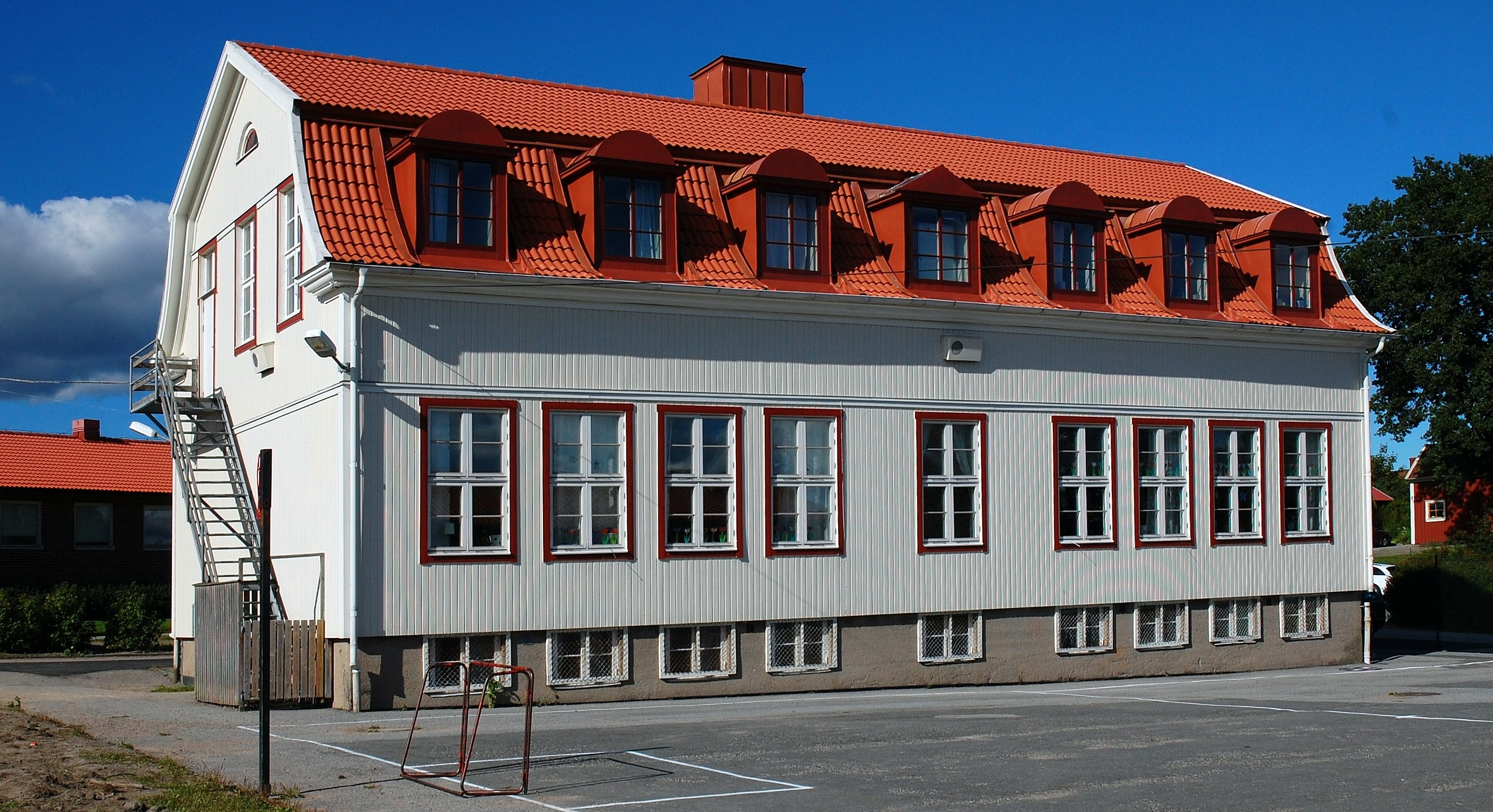 Centrumskolan i Munkedal, äldsta byggnaden uppförd omkring 1900